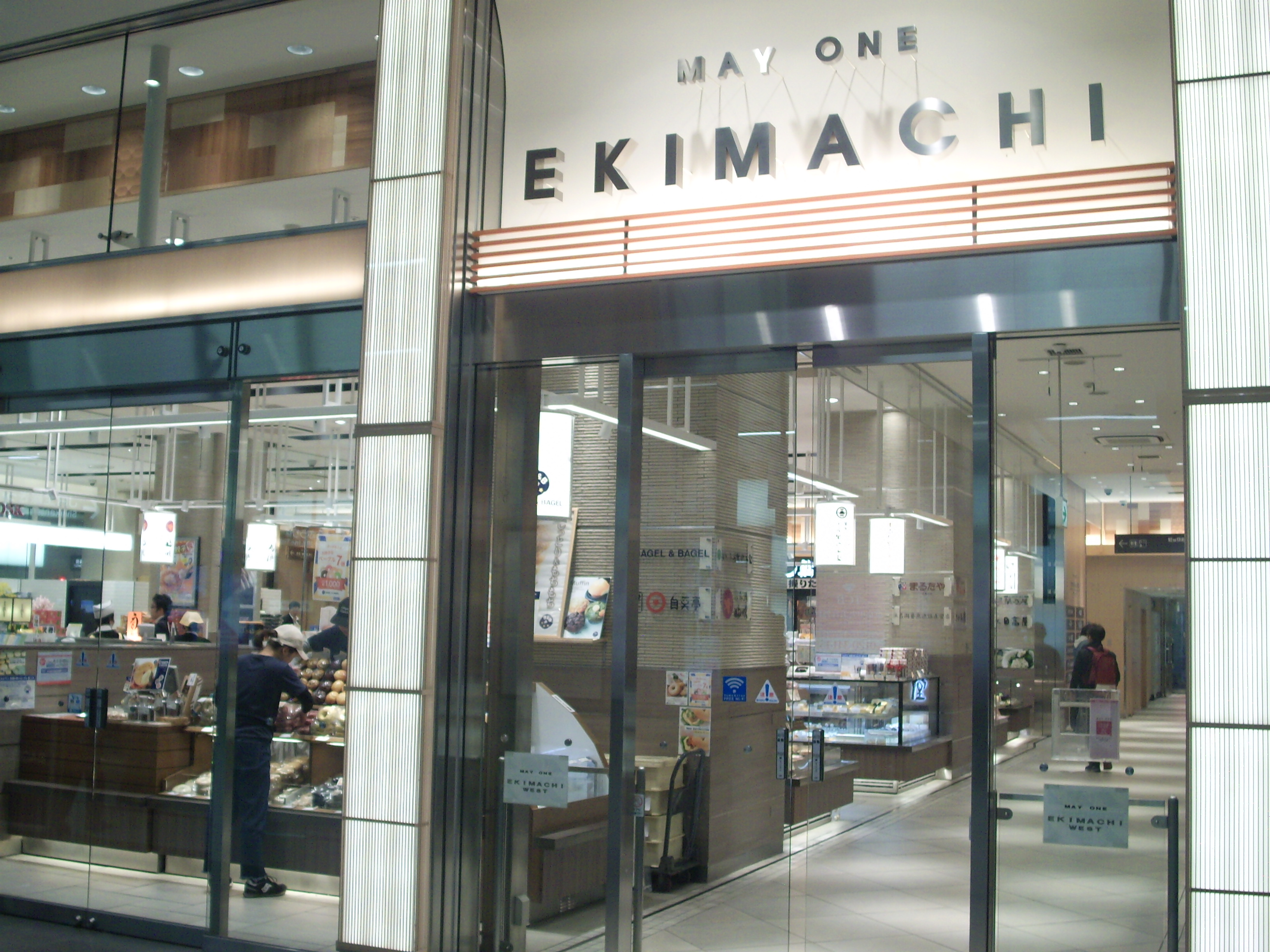 JR浜松駅の駅ビル「メイワン」のエキマチ ㊟カメラを起動すると日付機能が出荷時のものに初期化されるため、ファイル履歴の投稿日時とメタデータの原画像データの生成日時が異なります（本概要欄の下記日付が撮影日）